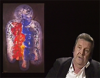 Portrait de Ladislas Kijno